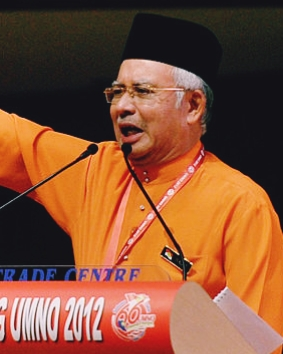 Kuala Lumpur, 01/12/2012 UMNO President, Datuk Seri Najib Razak during Umno General Assembly.. Pic Firdaus Latif